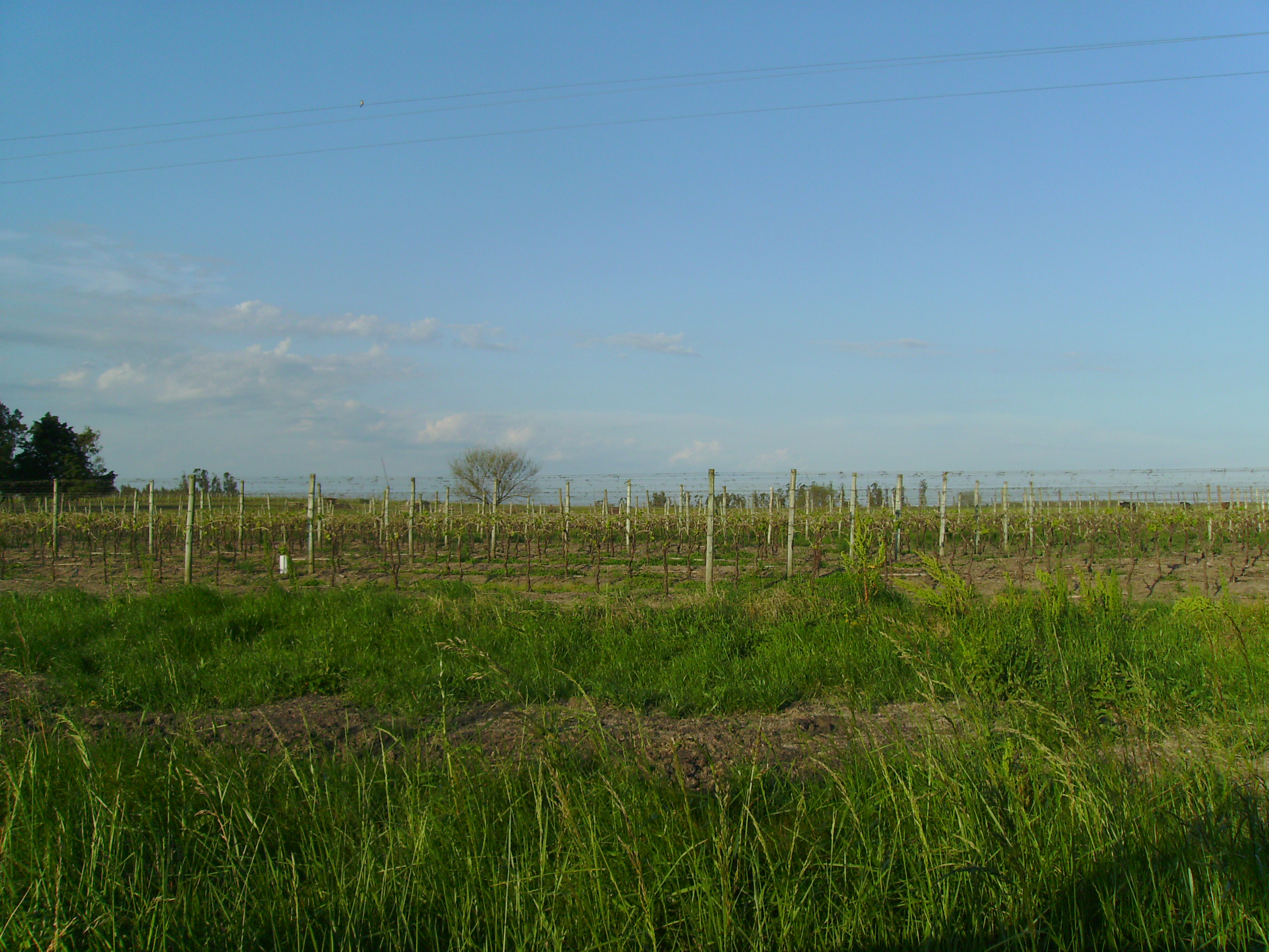 Uno de los viñedos al borde de la ruta.